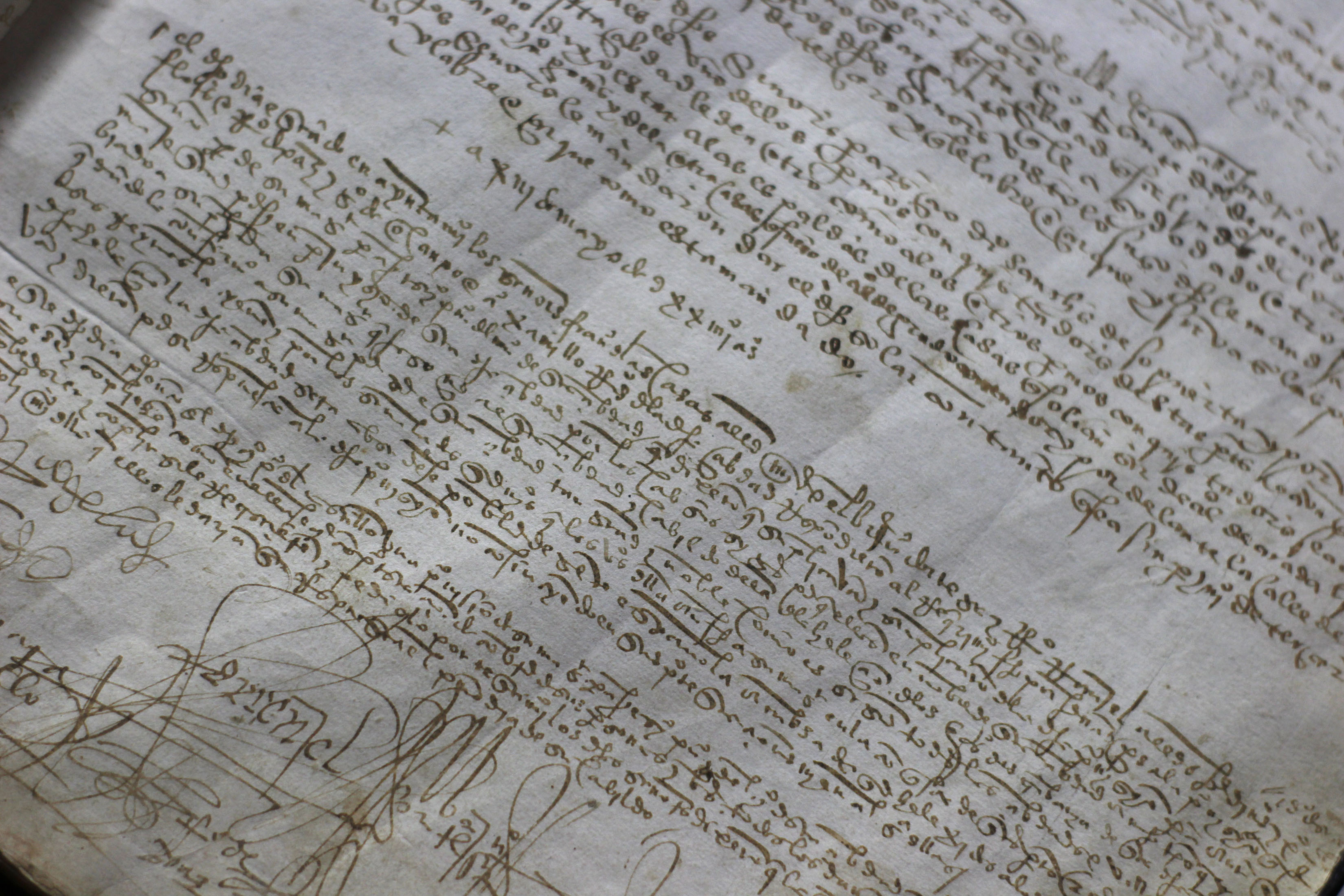 Martes 10 de marzo de 2020 En el Archivo Histórico de la Ciudad de México se encuentra la Primer Acta de Cabildo del Ayuntamiento de la Ciudad de México, la cual se elaboró el 8 de marzo de 1525, ésta será expuesta como la pieza del mes en marzo. Fotografía: Isaac López / Secretaría de Cultura de la Ciudad de México